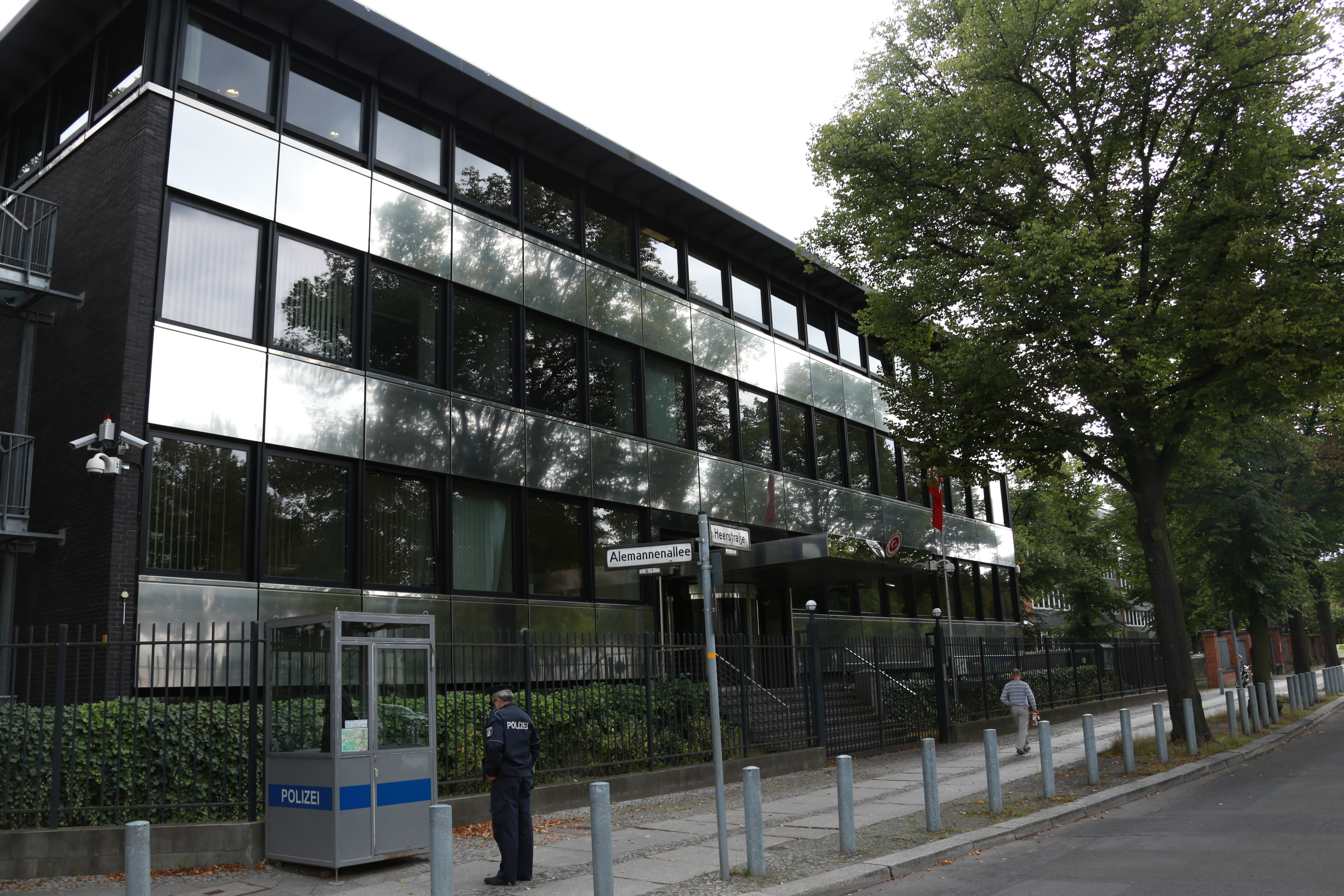 Türkische Botschaft in Berlin, Alemannenallee/Heerstrasse Turkish Embassy, Berlin